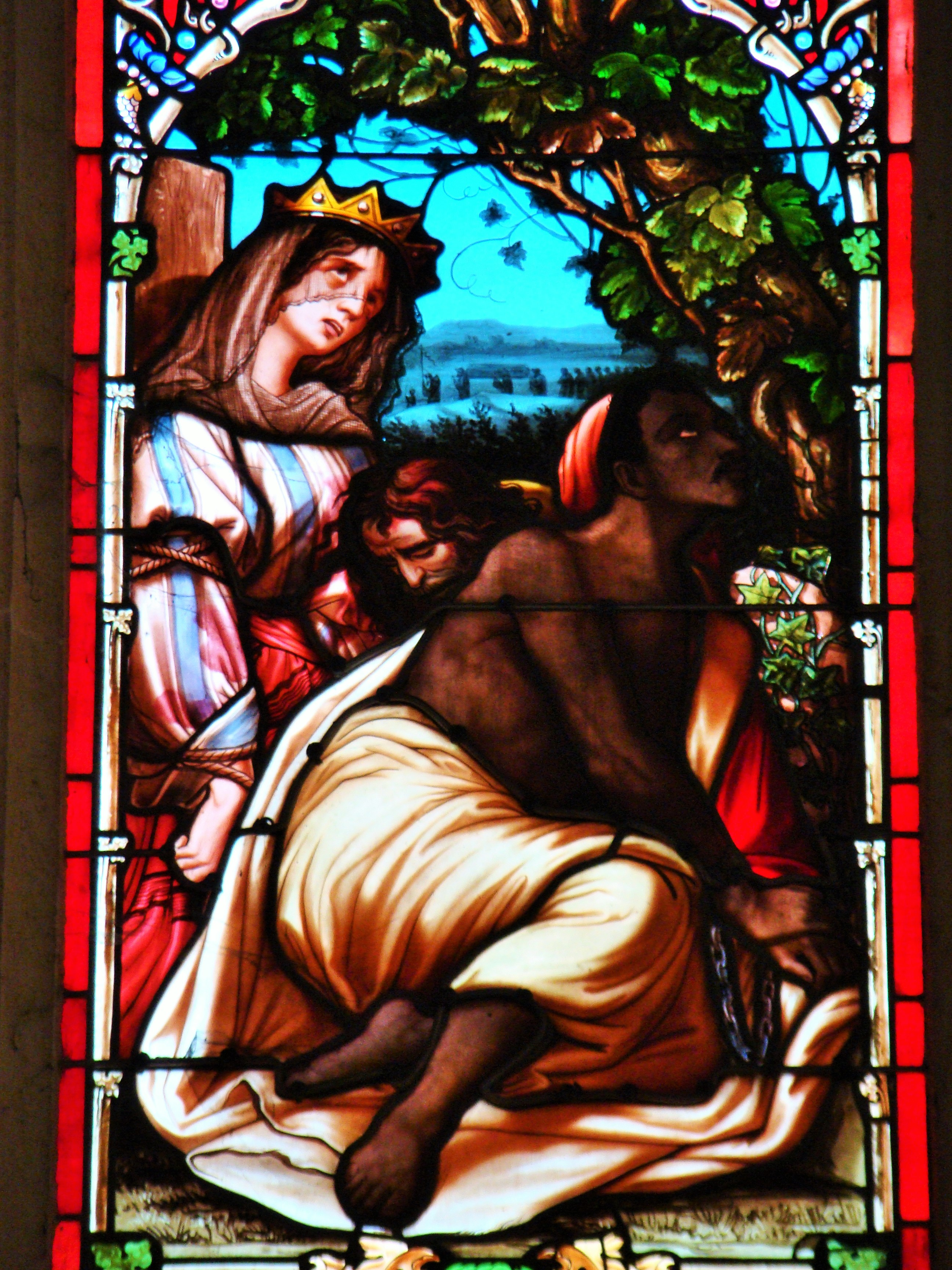 Vitrail central de l'église Saint-Pierre de Bordeaux, réalisé par Joseph Villiet, env. 1860. On y voit une reine blanche avec à ses pieds un esclave noir enchaîné.